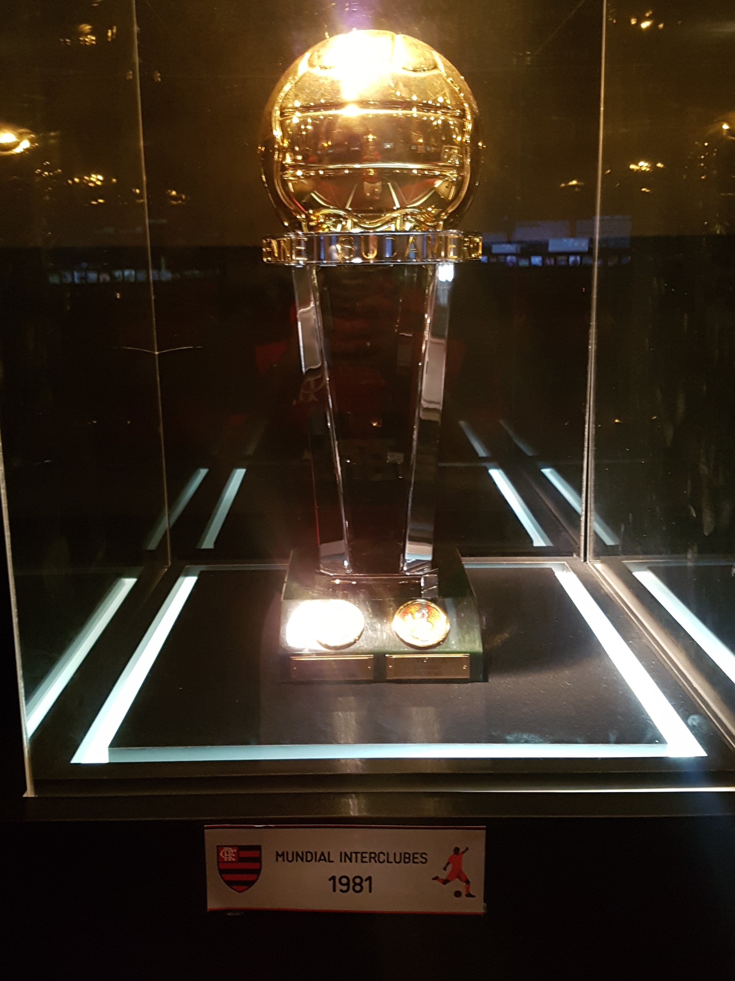 Taça Intercontinental de 1981 em exposição na Gávea.